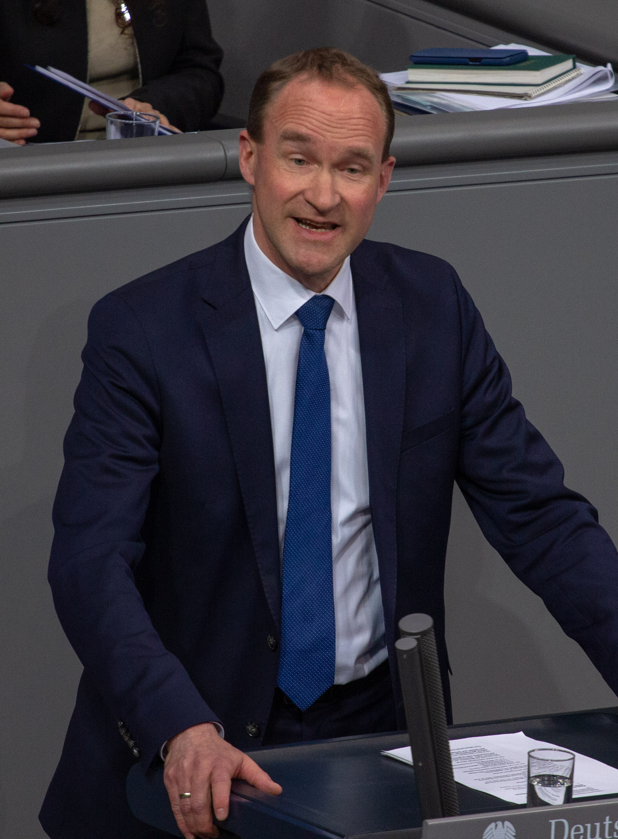 Norbert Altenkamp, Mitglied des Deutschen Bundestages, während einer Plenarsitzung am 11. April 2019 in Berlin.